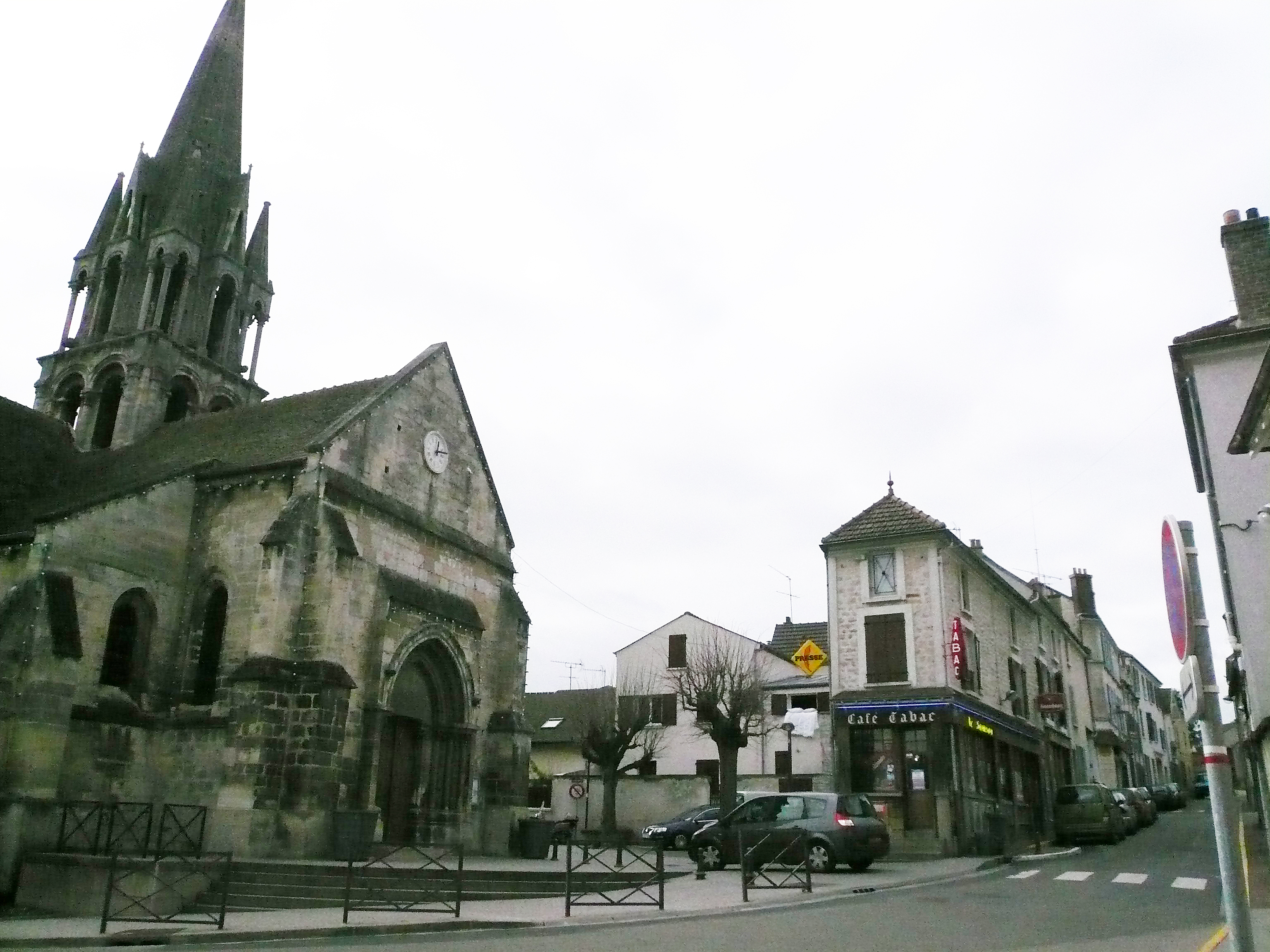 Le Vieux Village de Vernouillet, Yvelines, France (78)